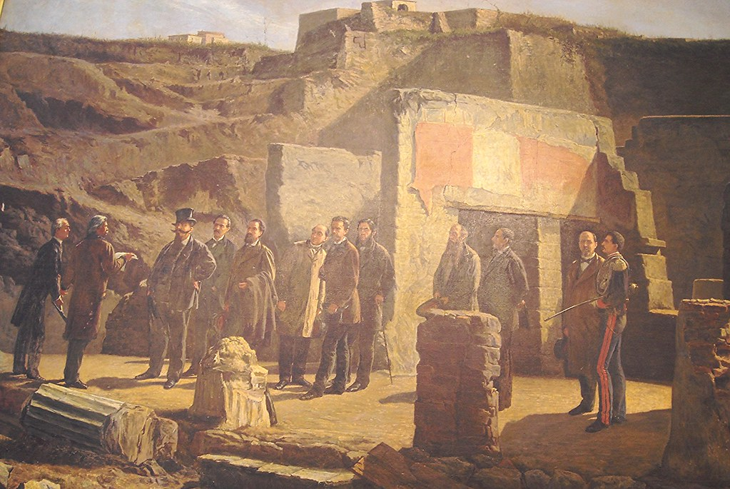 Vittorio Emanuele II visita Ercolano nel 1869, olio su tela, Museo Archeologico, Napoli